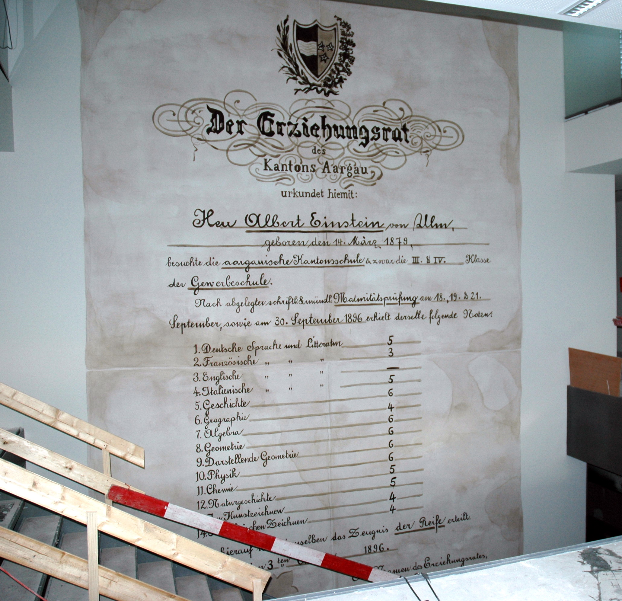 Während der Aufstockung des Naturwissenschaftlichen Gebäudes der Kantonsschule Baden wurde ein Kunstwerk an eine der leeren Gipswände platziert. Das Kunstwerk bildet das Maturazeugnis des bekannten Physikers Albert Einstein ab, inklusive aller zu dem Zeitpunkt existirenden Flecken auf dem Original.